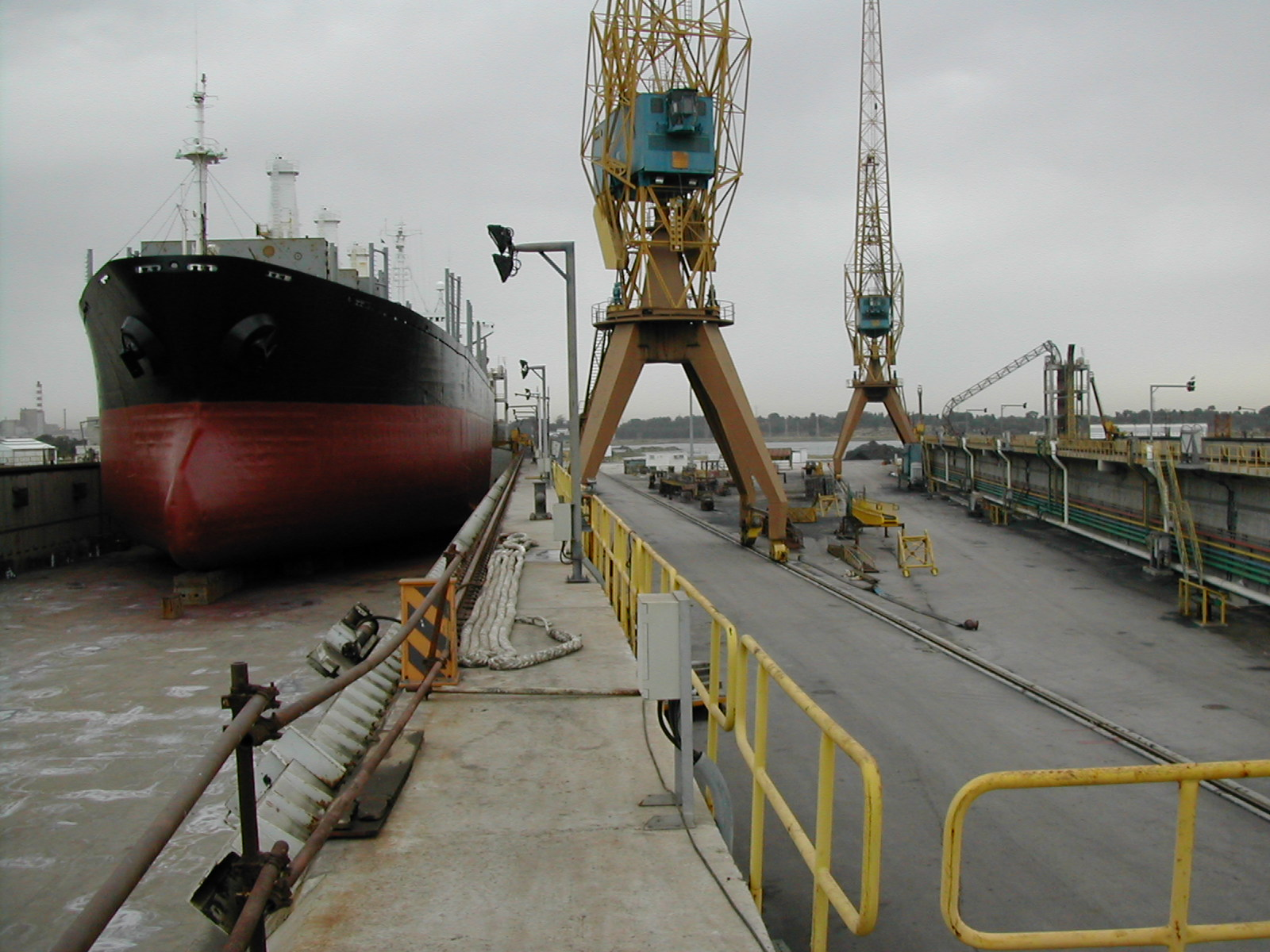 Doca 31 da Lisnave nos estaleiros da Mitrena em Setúbal, Portugal